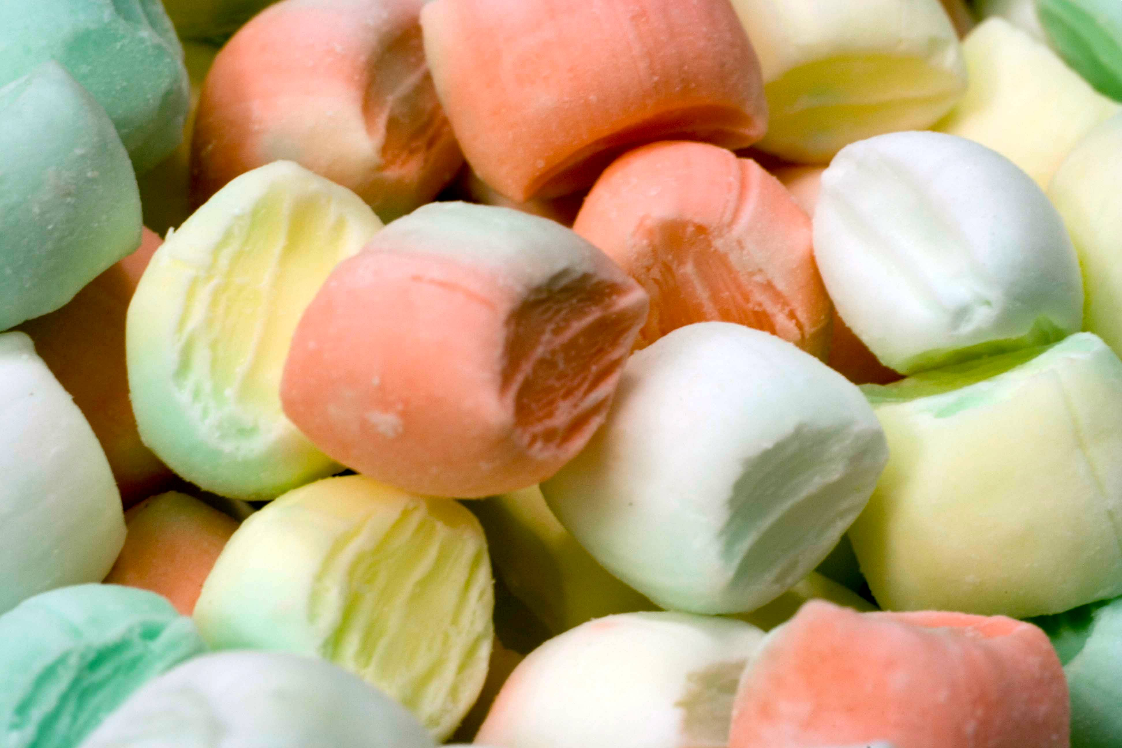 After dinner mints.